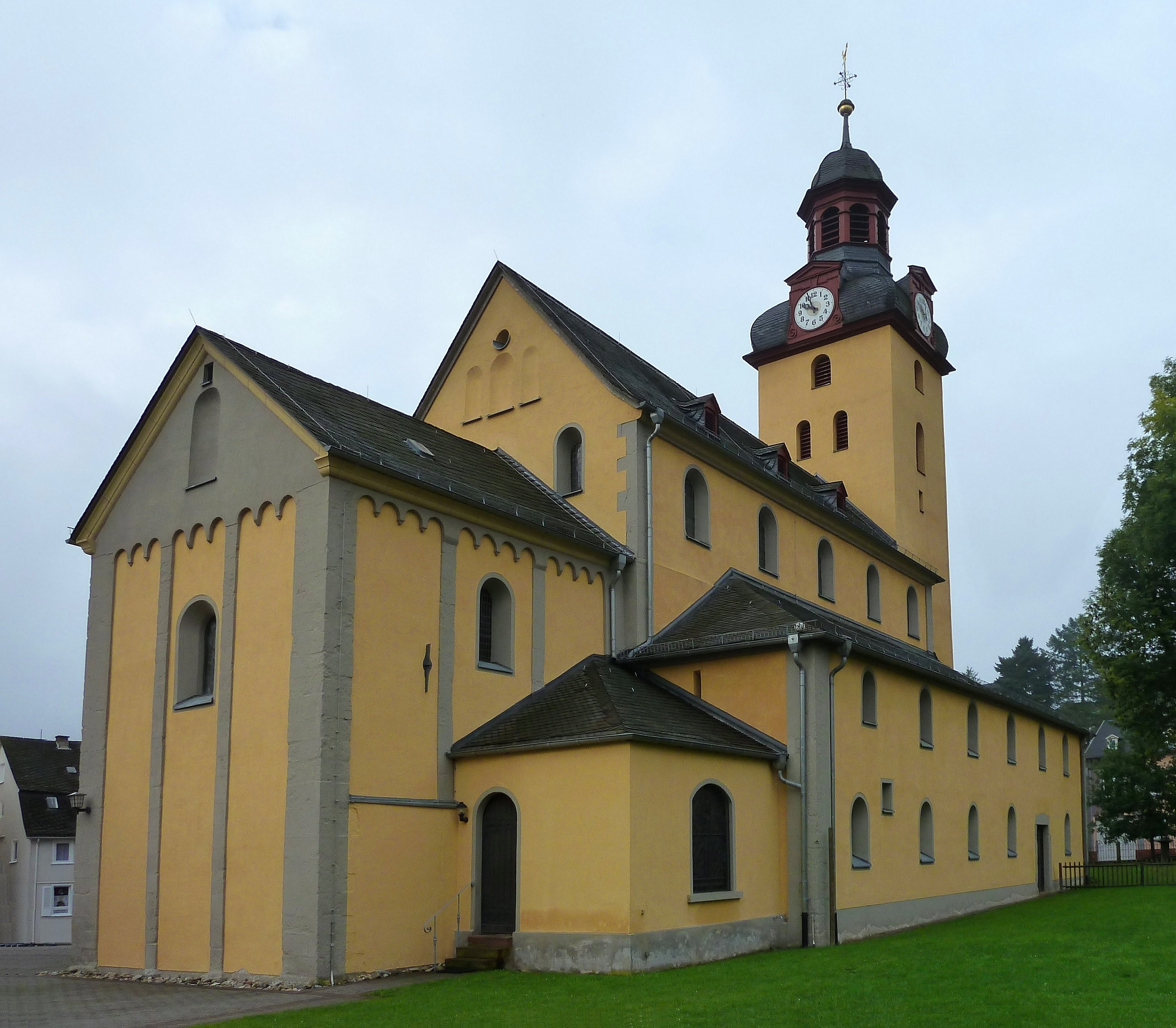 Bad Ems, ev. Martinskirche